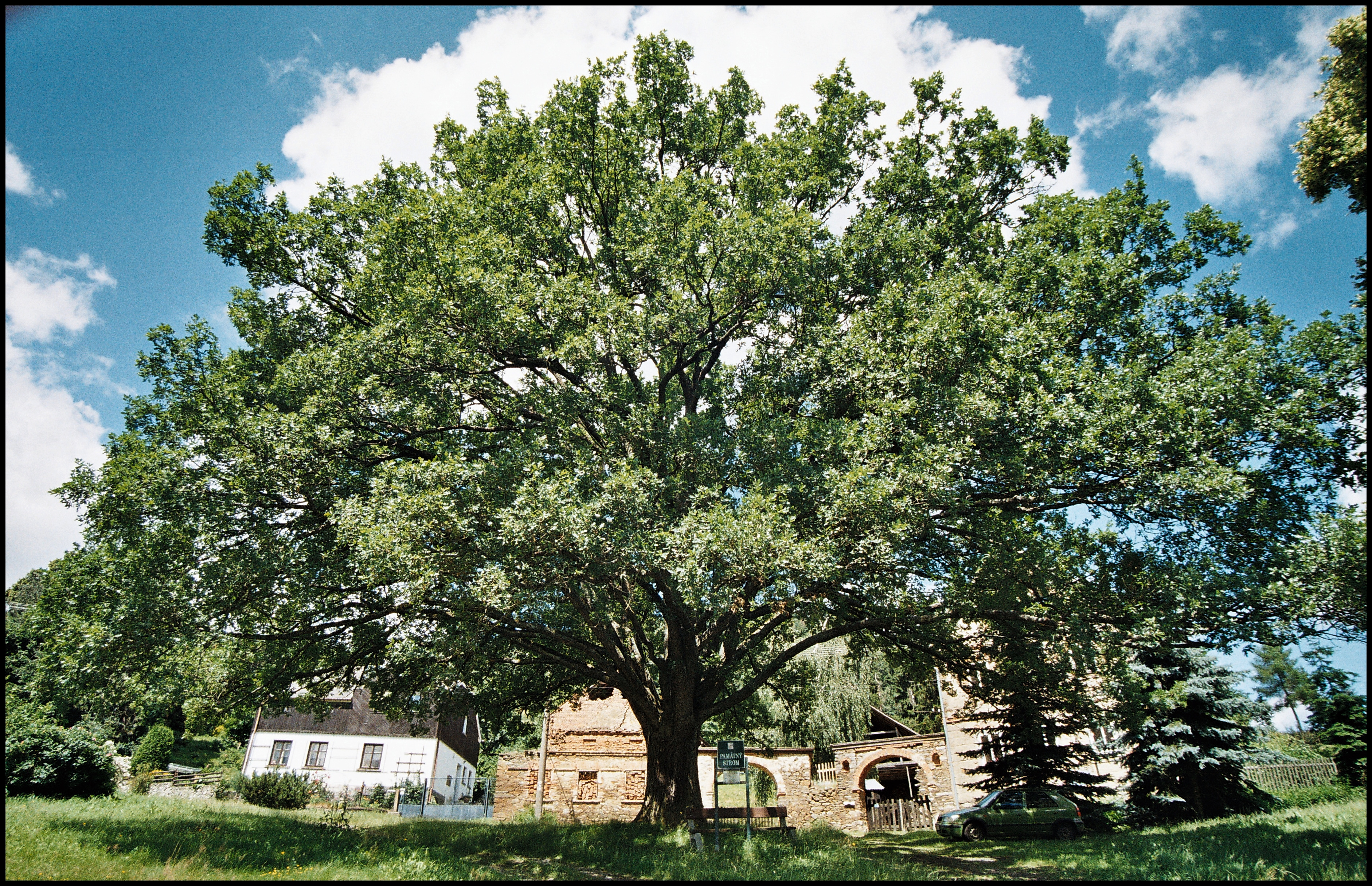 Dub na návsi v obci Branišov.